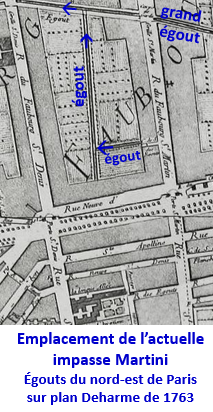 Ancien égout de l'impasse Martini dans le réseau du 18è siècle